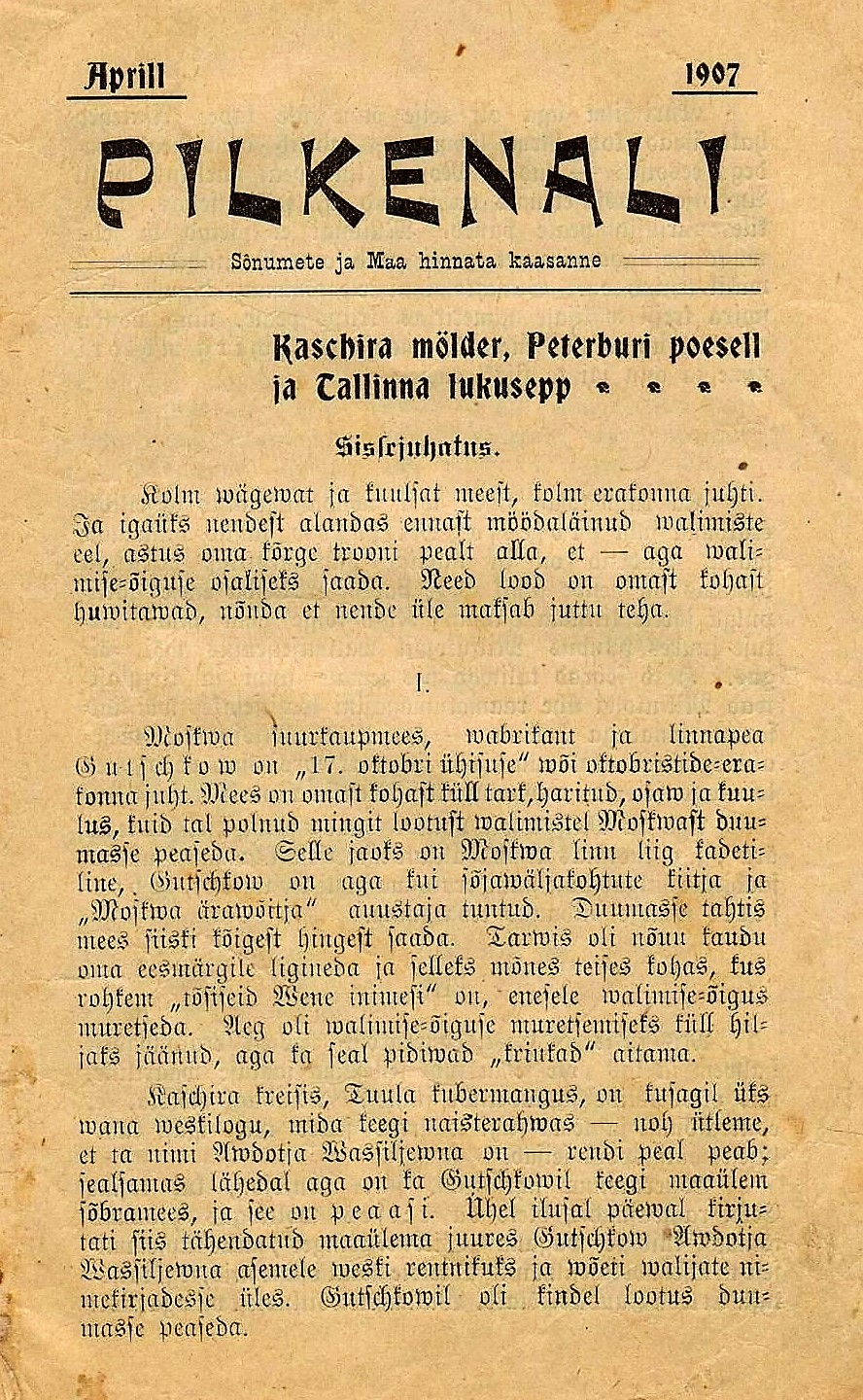 Pilkenali 1907 aprill esileht